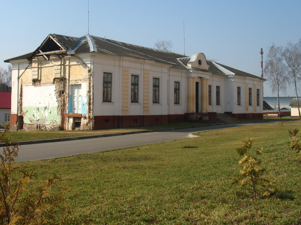 Беларуская (тарашкевіца): Івацэвічы. Палац Юндзілаў.